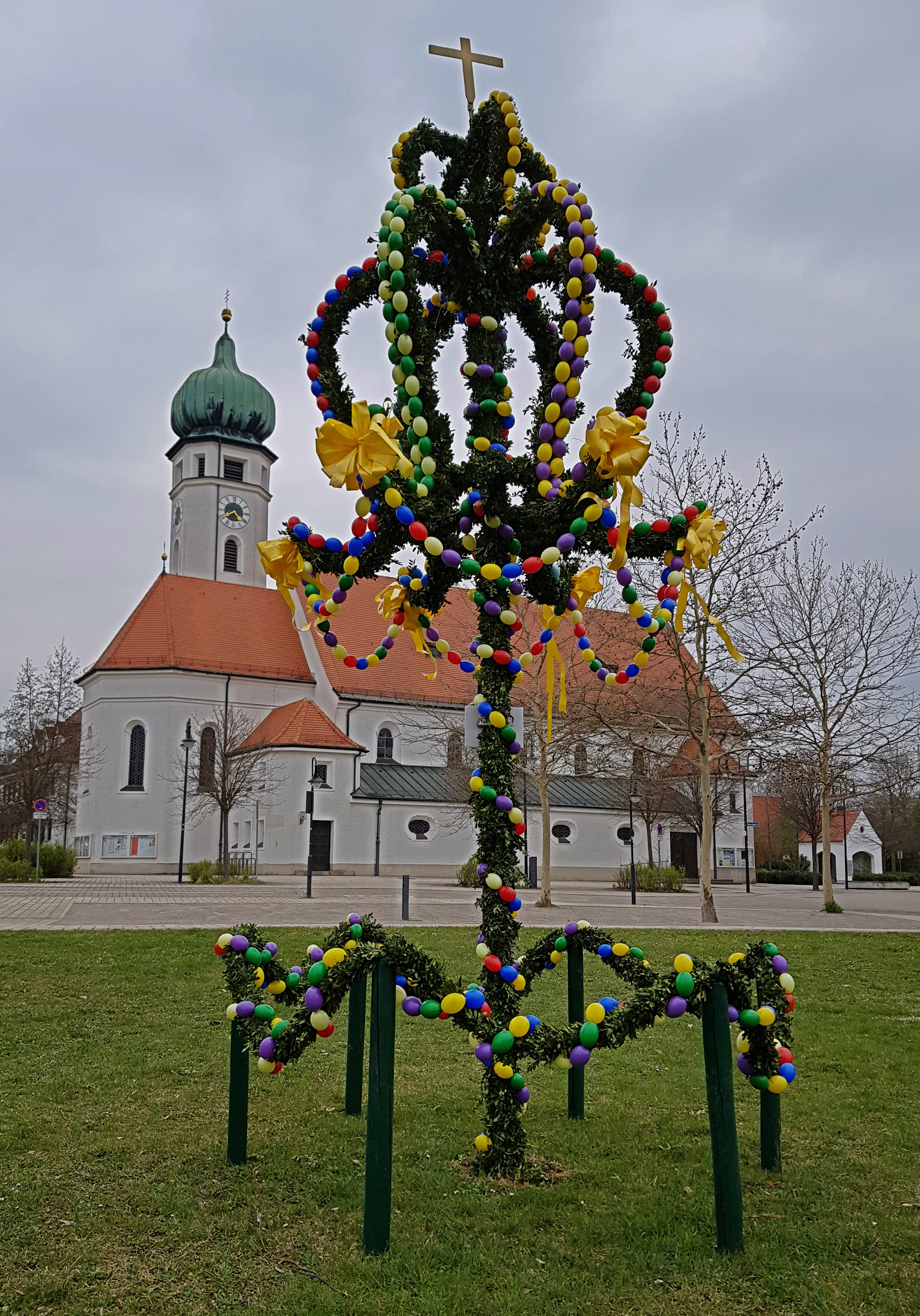 Eine Sog. Osterkrone auf der Rathauswiese vor der katholichen Kirche in Eichenau (Oberbayern) mit über 200 Eiern. Erstellt von der "Frauen Union Eichenau" 2019